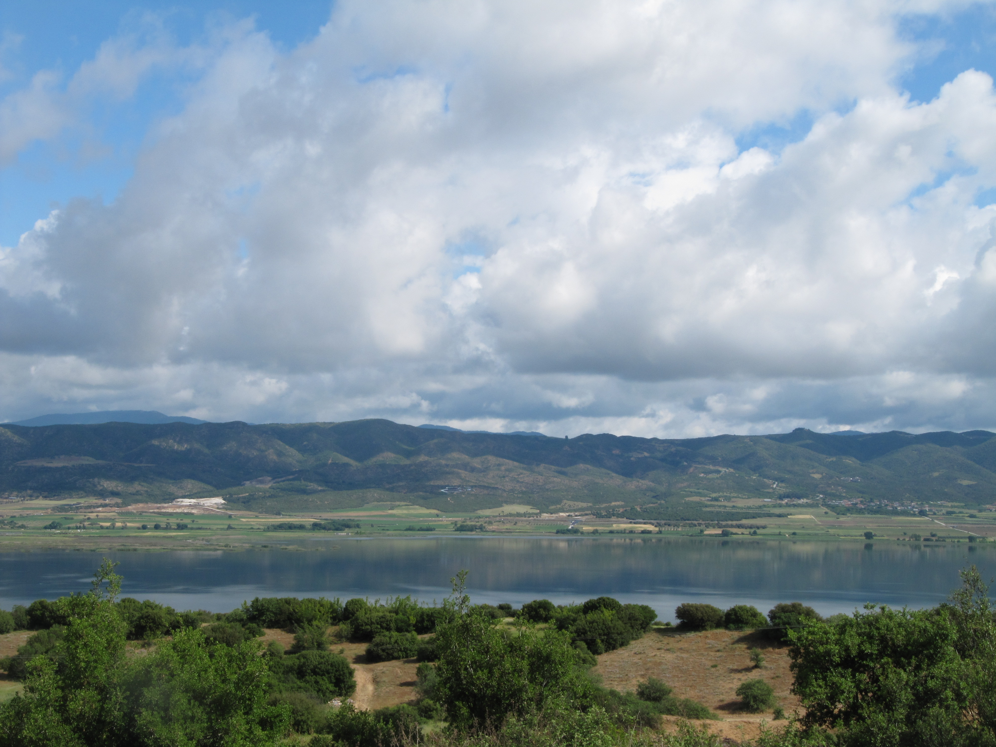 Koronia, Greece